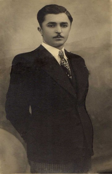 Xhavid Beli